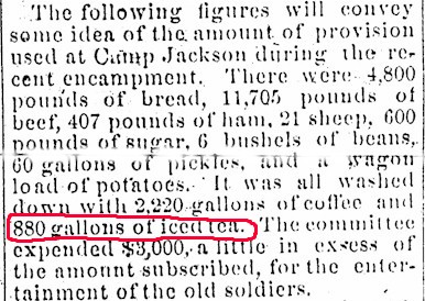 Imagen con mas de 150 años. Extracto de artículo en el periódico Nevada Noticer, el 28 de septiembre del 1890.